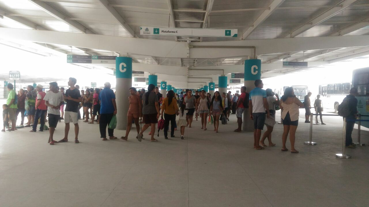 Plataforma C do terminal de ônibus urbano da Messejana.